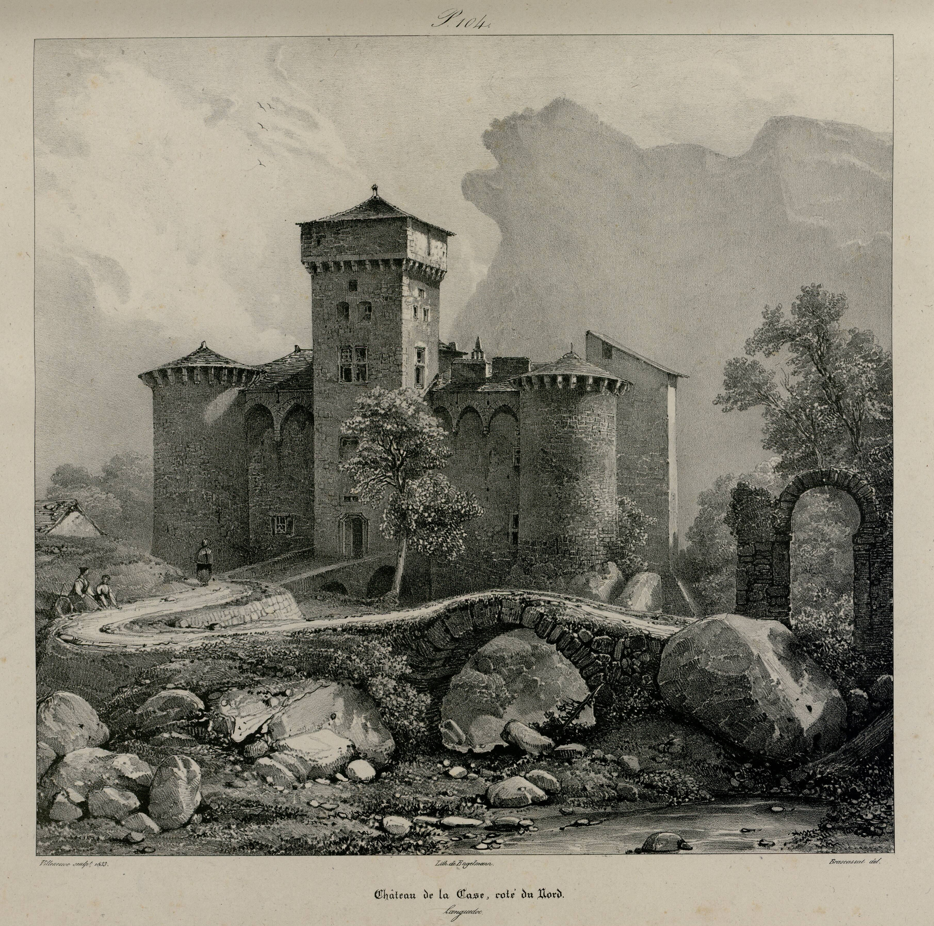 Lithographie représentant le château de la Caze (Laval-du-Tarn)